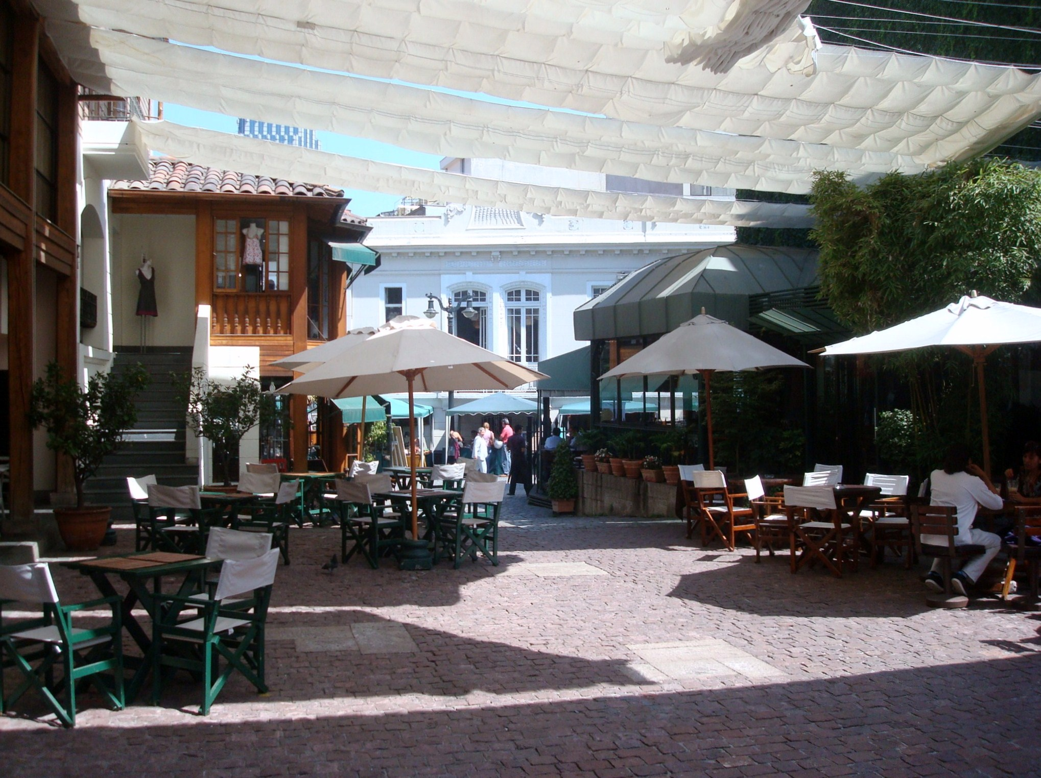 Plaza Mulato Gil de Castro, Barrio Lastarria, Santiago Centro, Chile